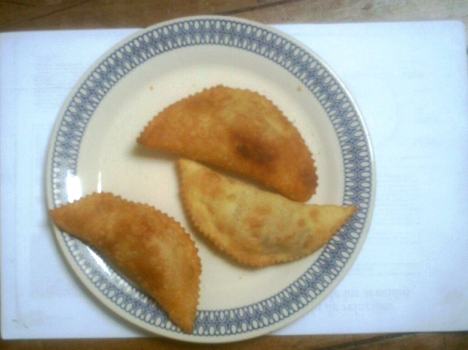 Empanadas de carne fritas.